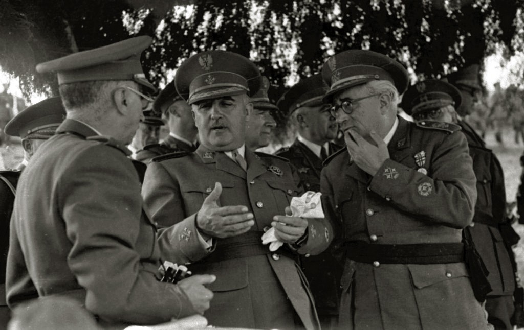 Título original: Francisco Franco junto a autoridades militares en unas maniobras (13/19) Localización: Guipúzcoa